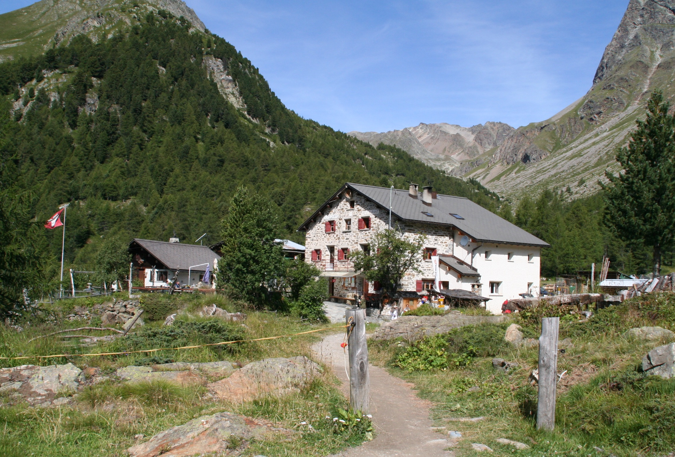 Val di Campo Berghaus Val Campo